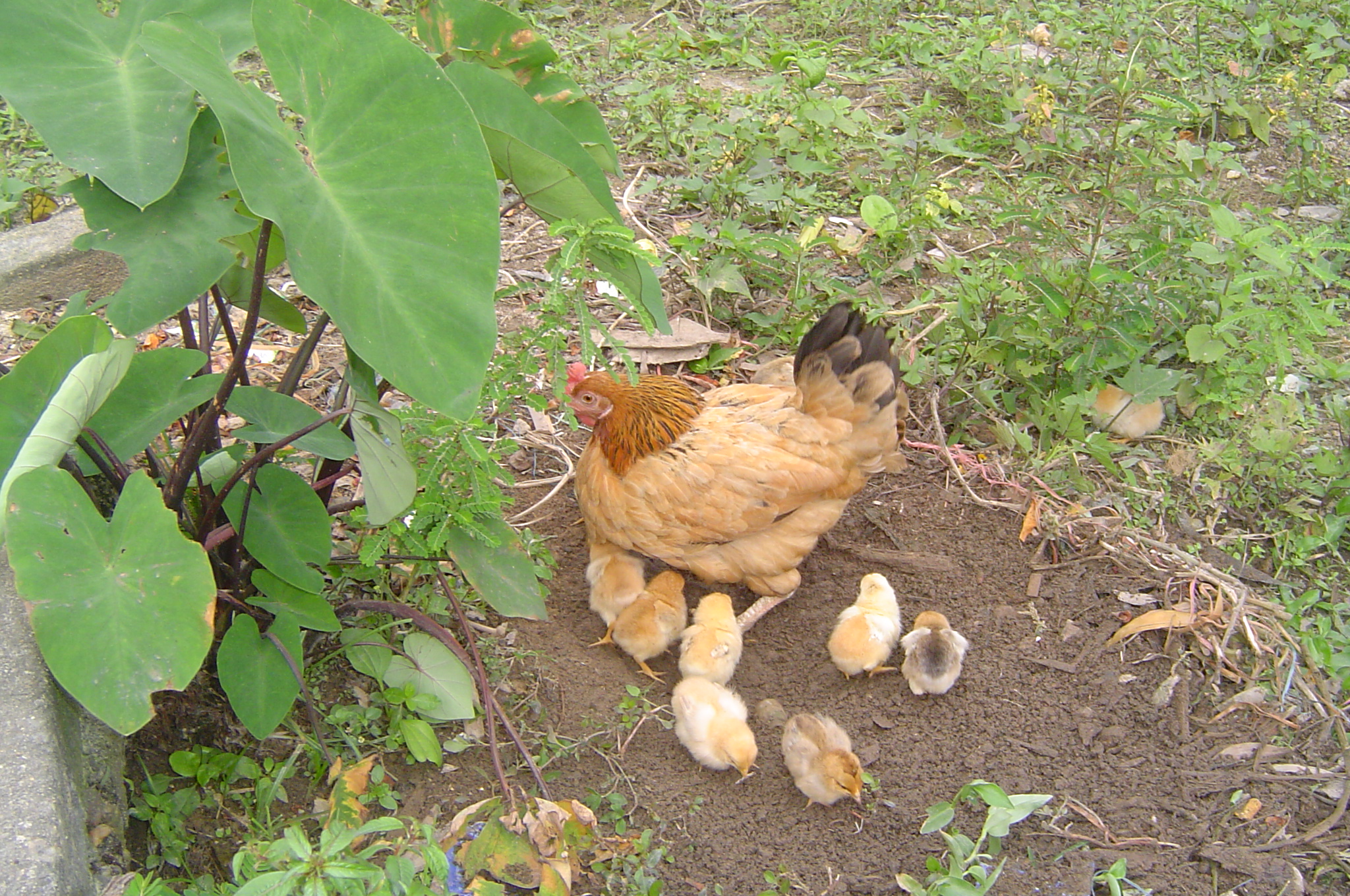 Một đàn gà gồm gà mẹ và gà con